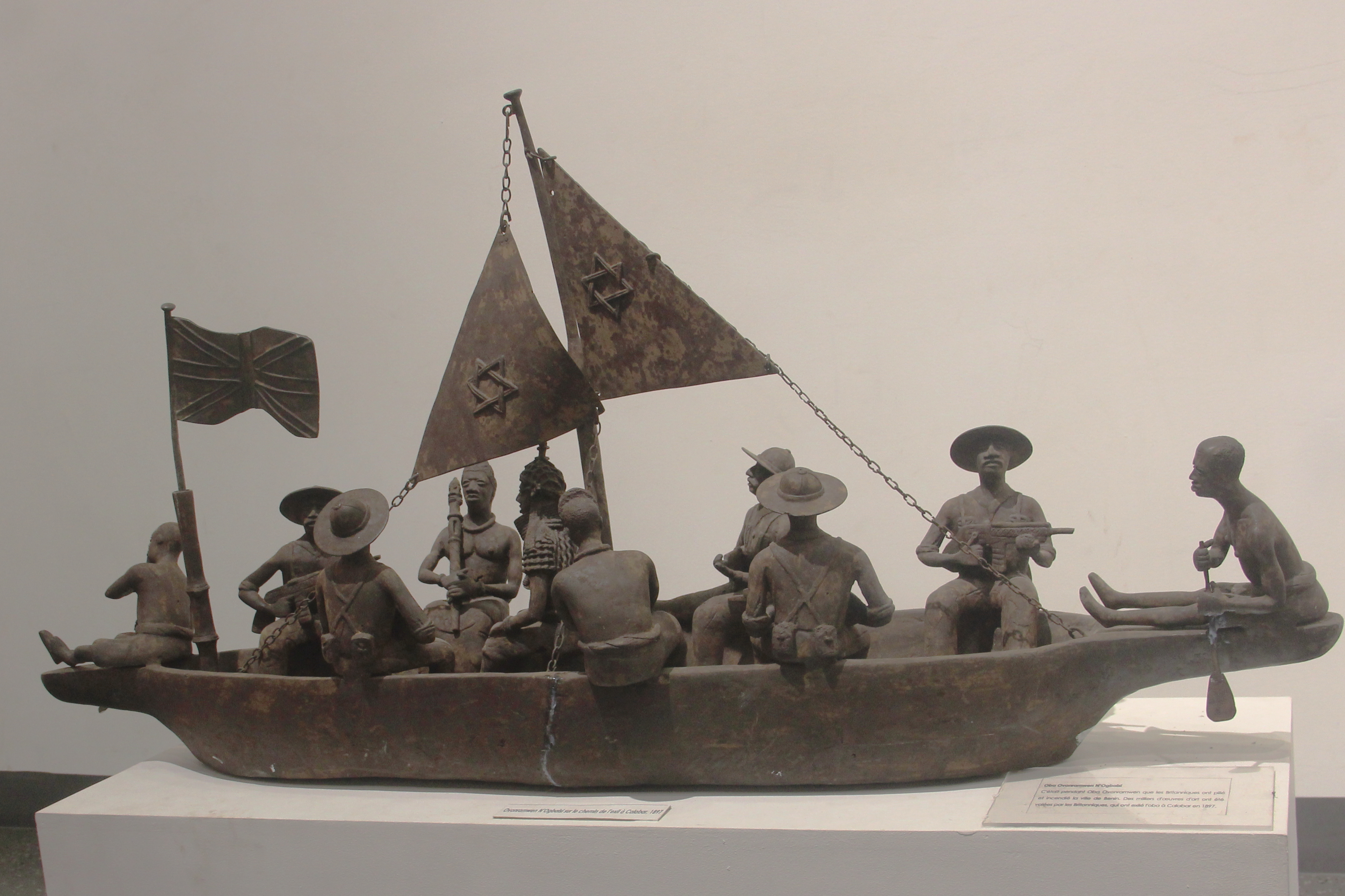 Ovǫnramwęn Nǫgbaisi sur le chemin de l'exil à Calabar. Sculpture exposée au Musée des Civilisations Noires de Dakar This is an image with the theme "Africa on the Move or Transport" from: Senegal